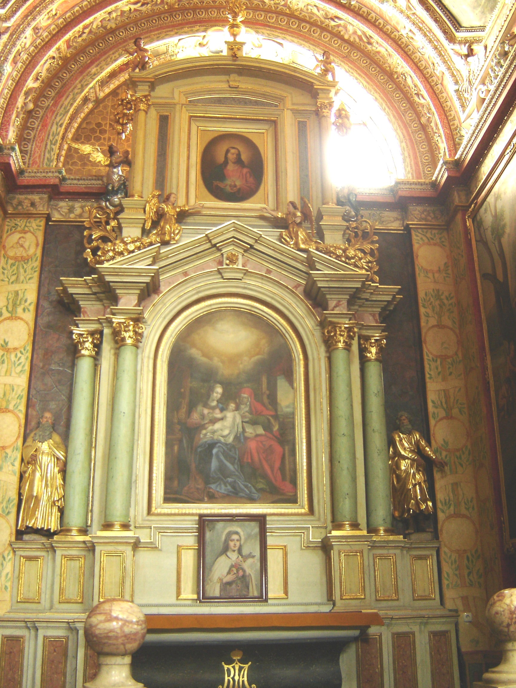 Kraków, Bielany, Poland / The Monastery